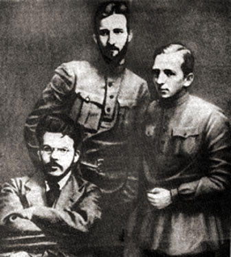 Володимир Затонський, Юрій Коцюбинський, Андрій Бубнов: фотографія